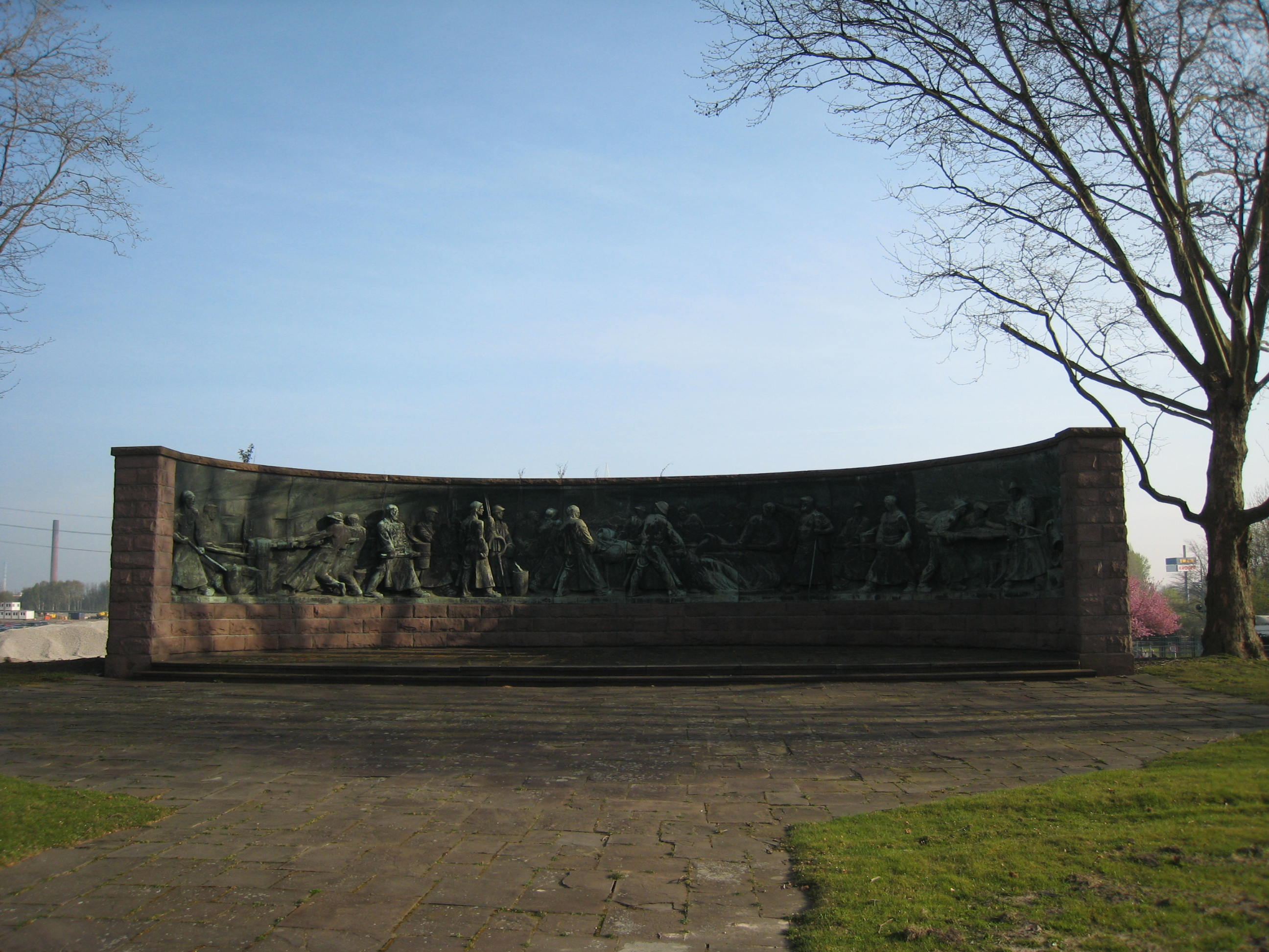 Kruppdenkmal, Essen